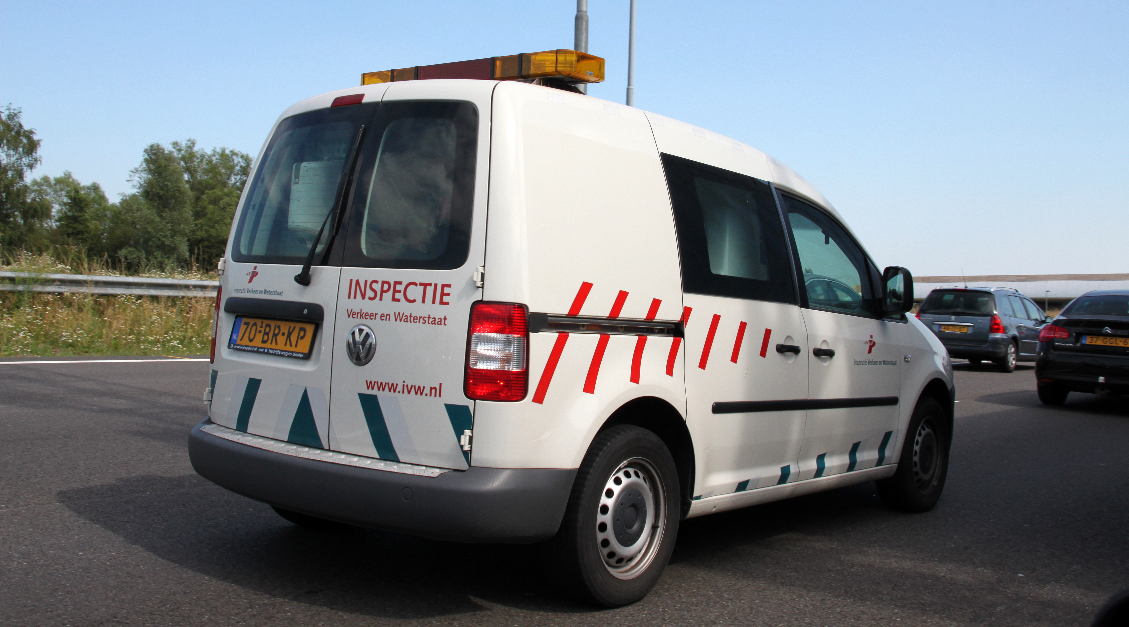 Een busje van de Inspectie Verkeer & Waterstaat op Rijksweg 2.